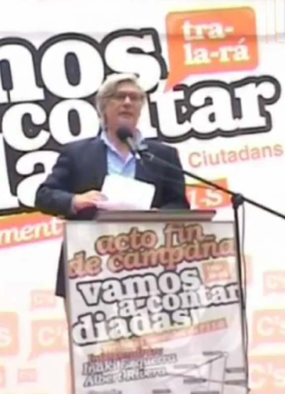 Eñaki Ezquerra durant l'acte del Partit de la Ciutadania